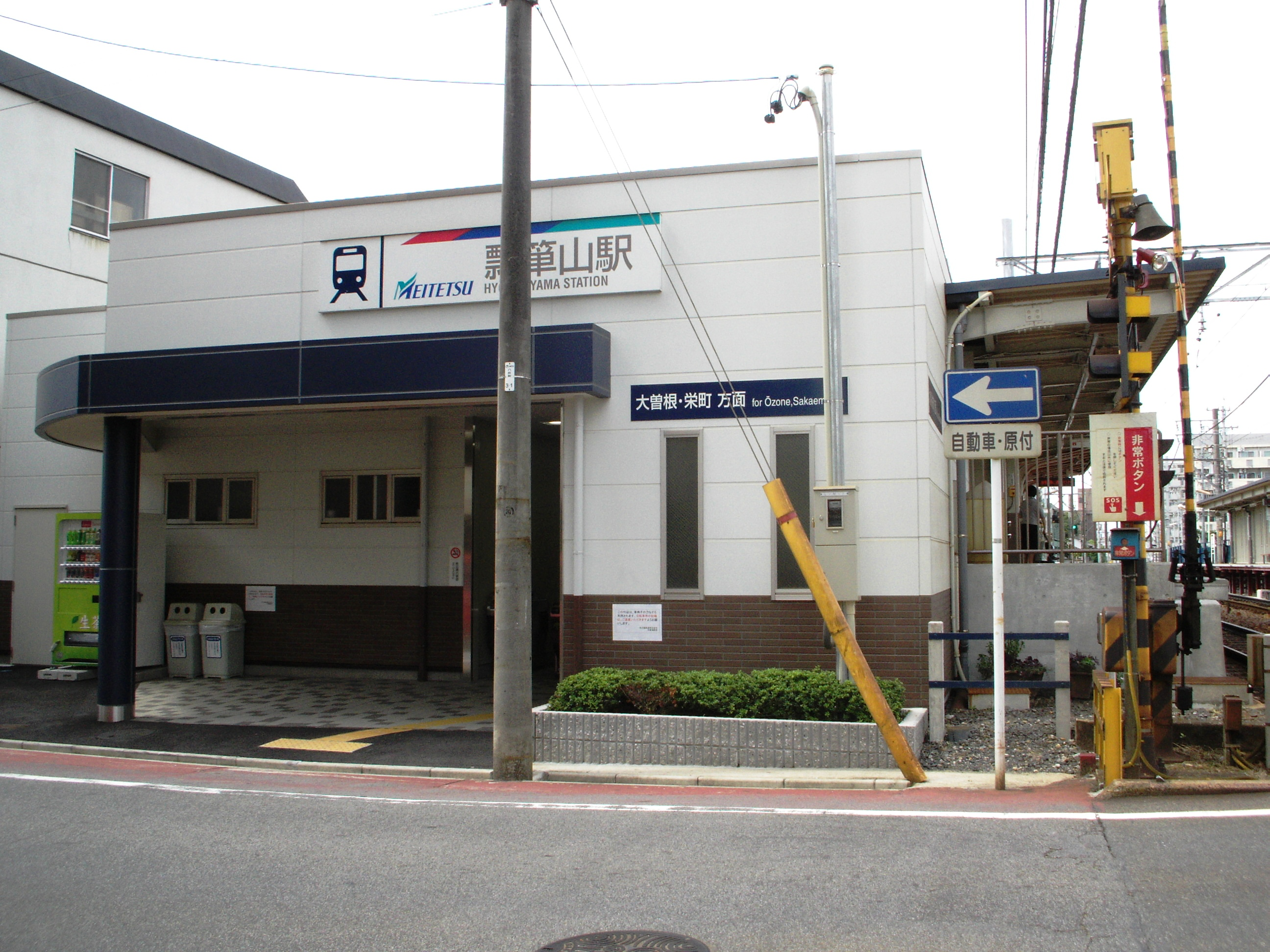 瓢箪山駅栄方面ホーム入り口